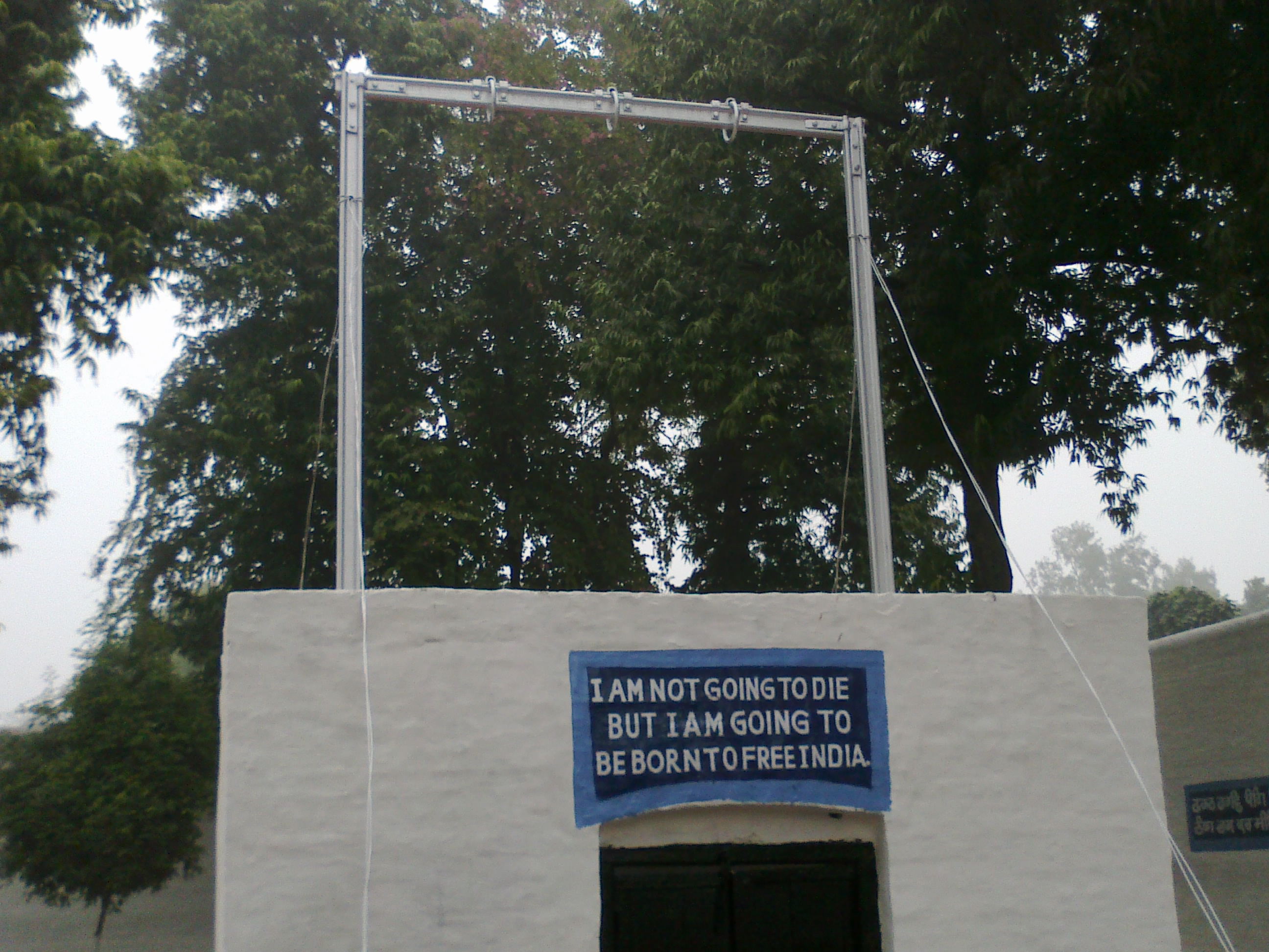 Rajendra nath lahiri is the hero hindustani उत्तर प्रदेश के गोण्डा जिला कारागार में स्थित फाँसीगृह के इसी फँदे पर लाहिड़ी ने शहादत दी। इसकी दीवारों पर तत्कालीन जेलर को दिया गया उनका अंतिम संदेश आज भी अंकित है।